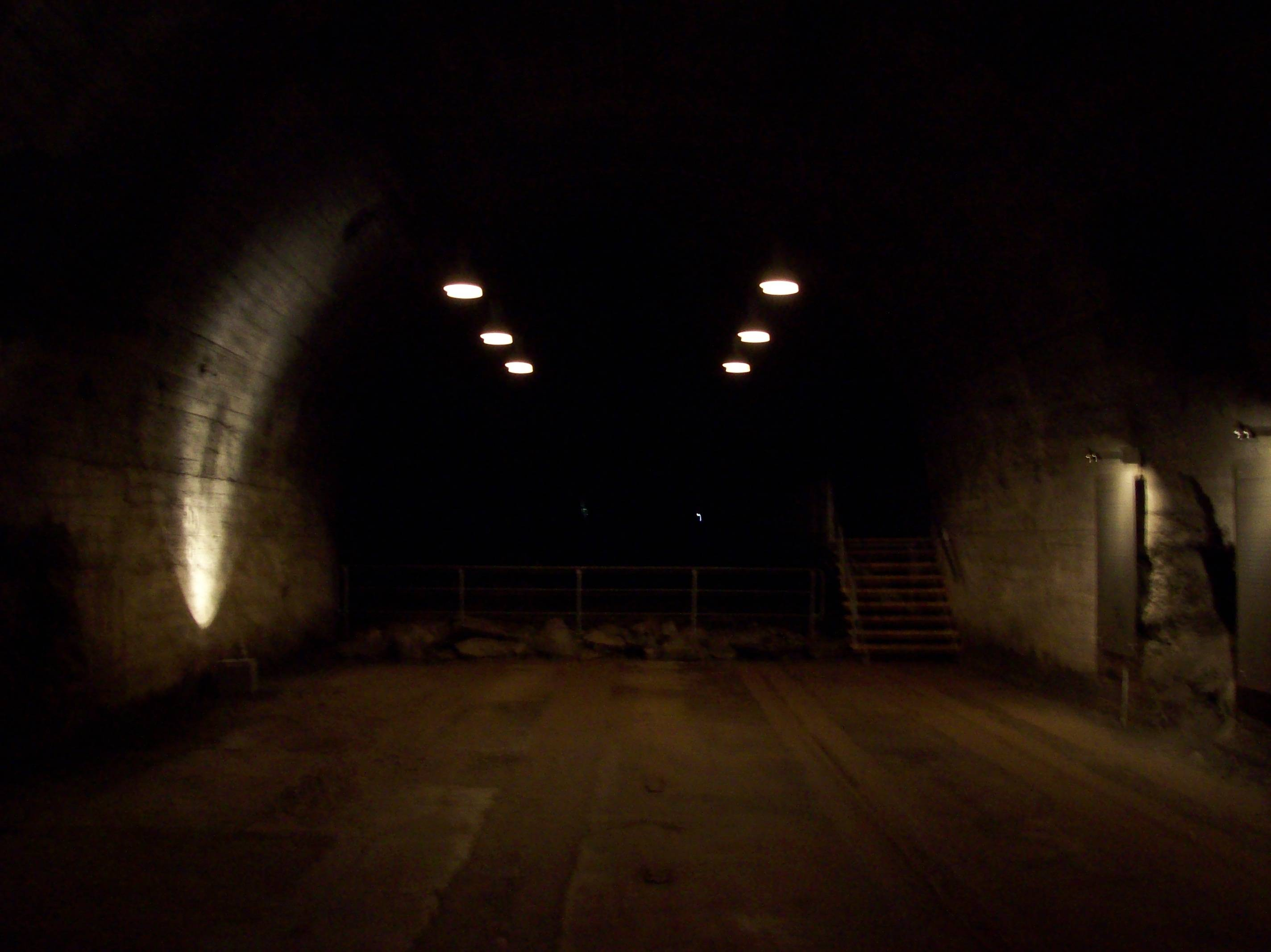 Ein Stollen im Konzentrationslager Dora